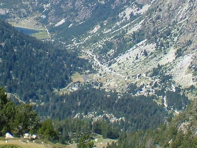 Roca de la Cremada, vists des de la Vall de Morrano; la Vall de Boí, Alta Ribagorça, Catalunya